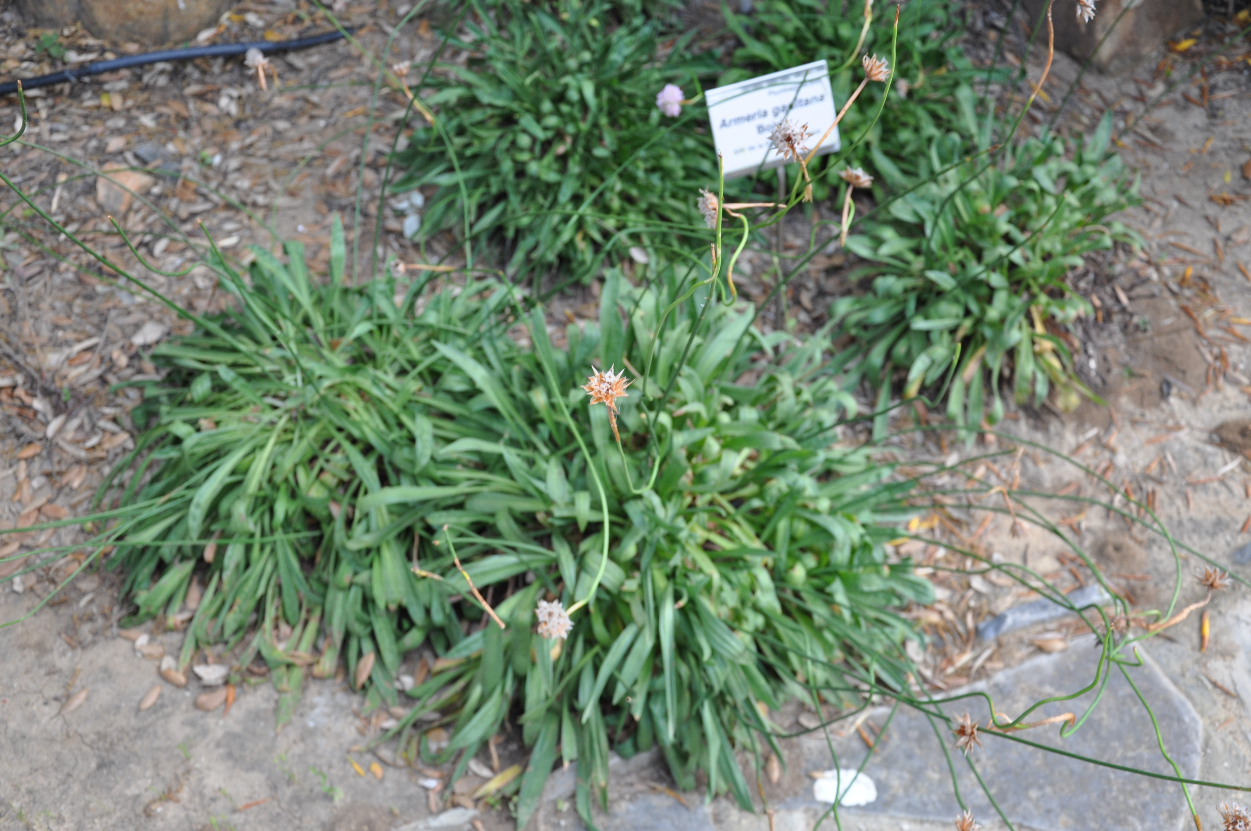 Armeria gaditana en el Jardín Botánico El Aljibe, Alcalá de los Gazules, Cádiz, España